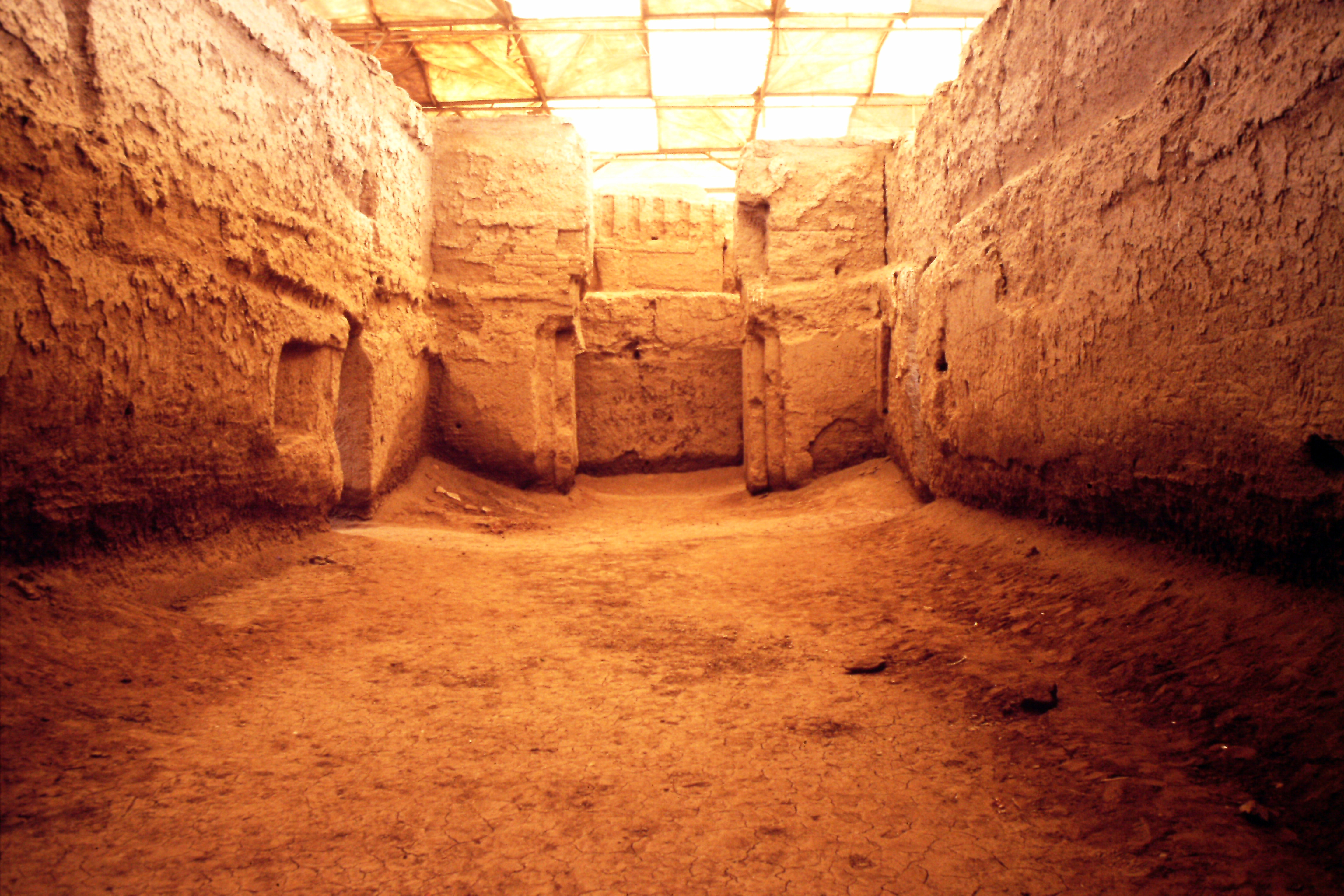 Mari, 1993